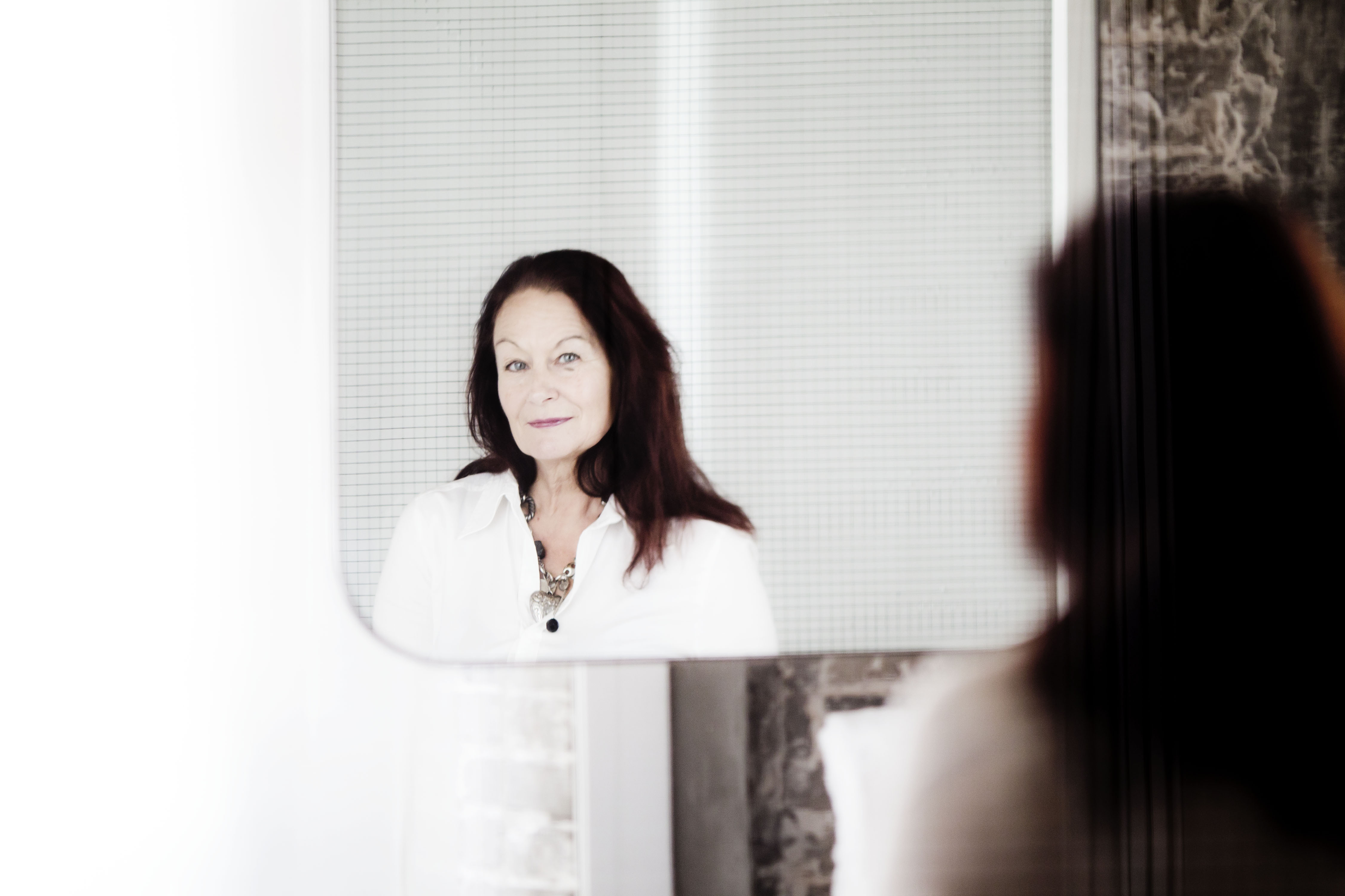 Rosi S.M.